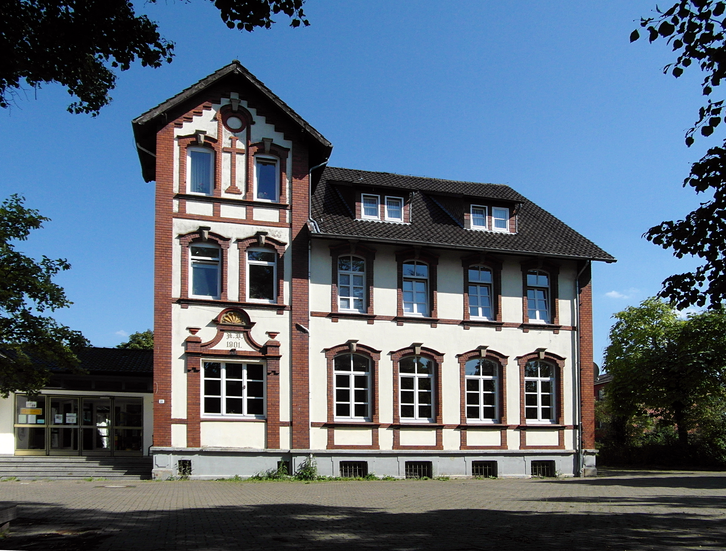 Die Volksschule Neustadtstraße 31 in Gestorf wurde im Jahre 1901 erbaut